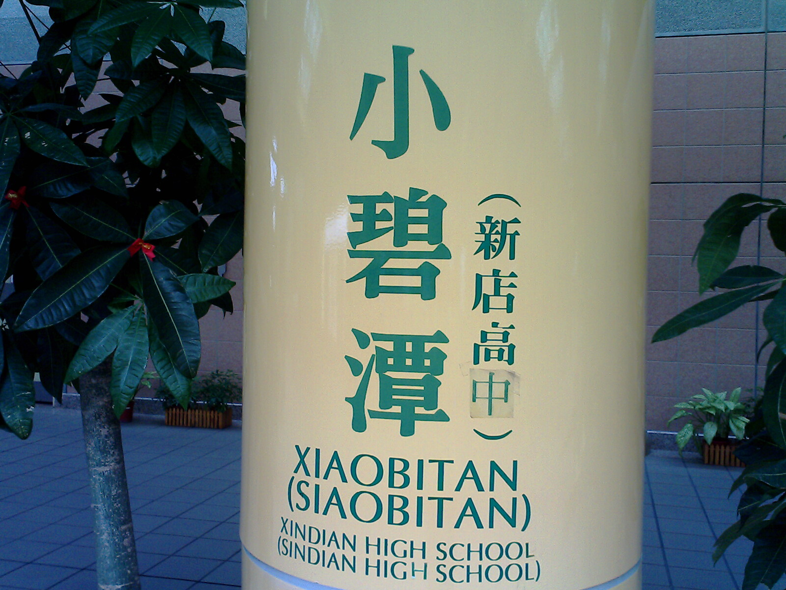 臺北捷運小碧潭站其中之一的柱子。